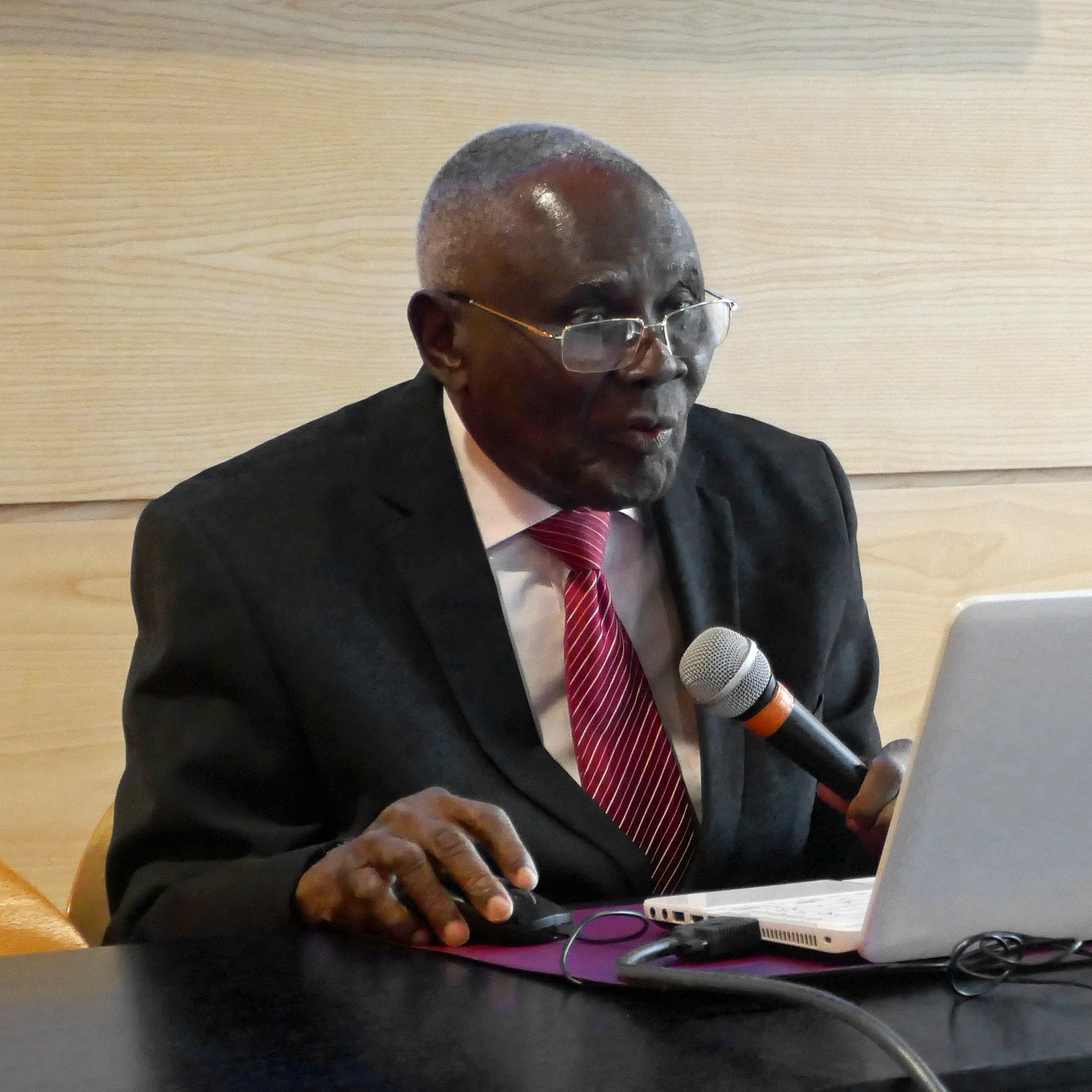 Conférence du professeur Akin Mabogunje (Nigeria) sur le thème Geography and the Challenges of Development in Africa: A Personal Odyssey, dans le cadre du 28e Festival international de géographie (FIG).